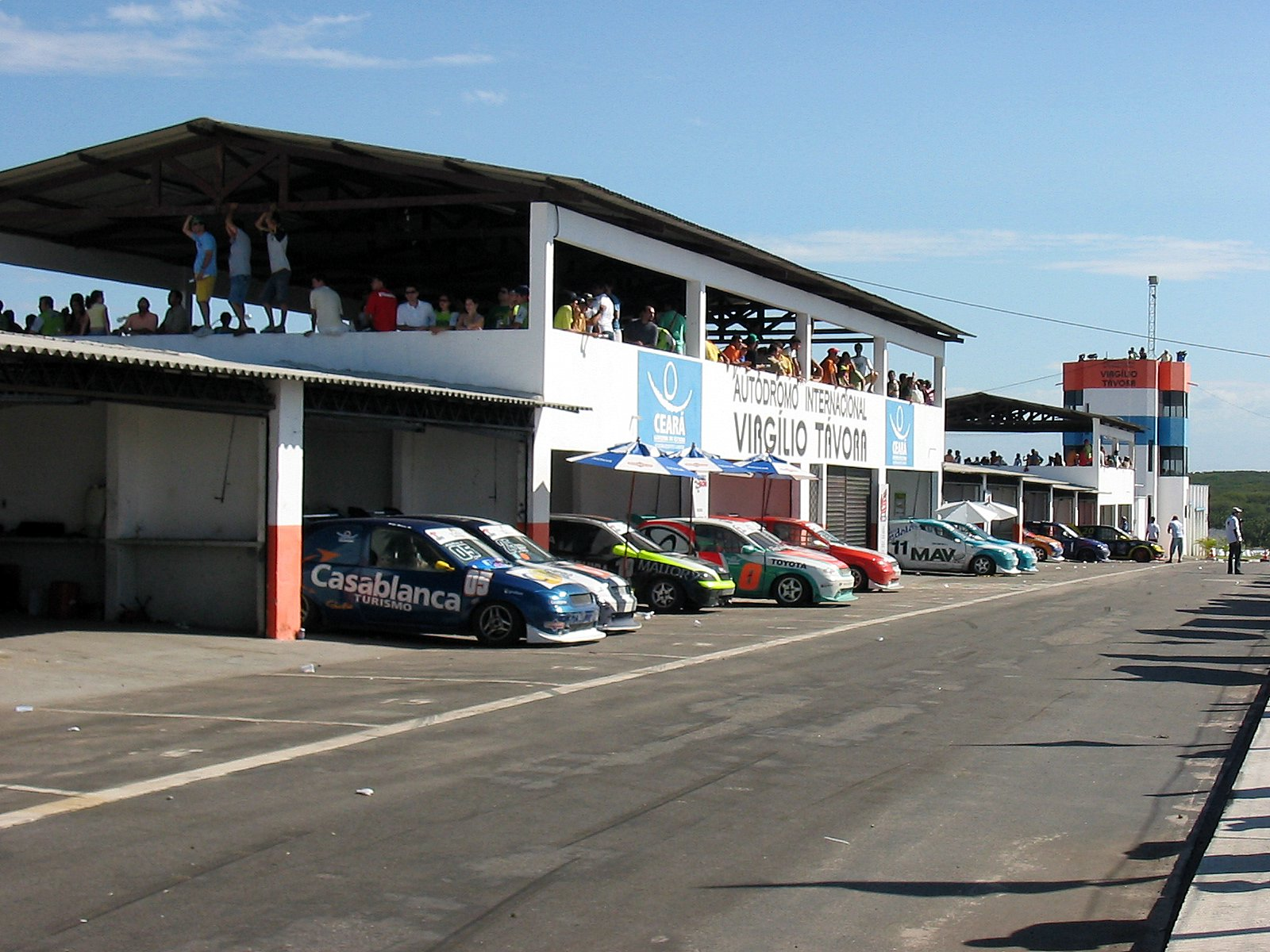 Carros do Super turismo no Padoc